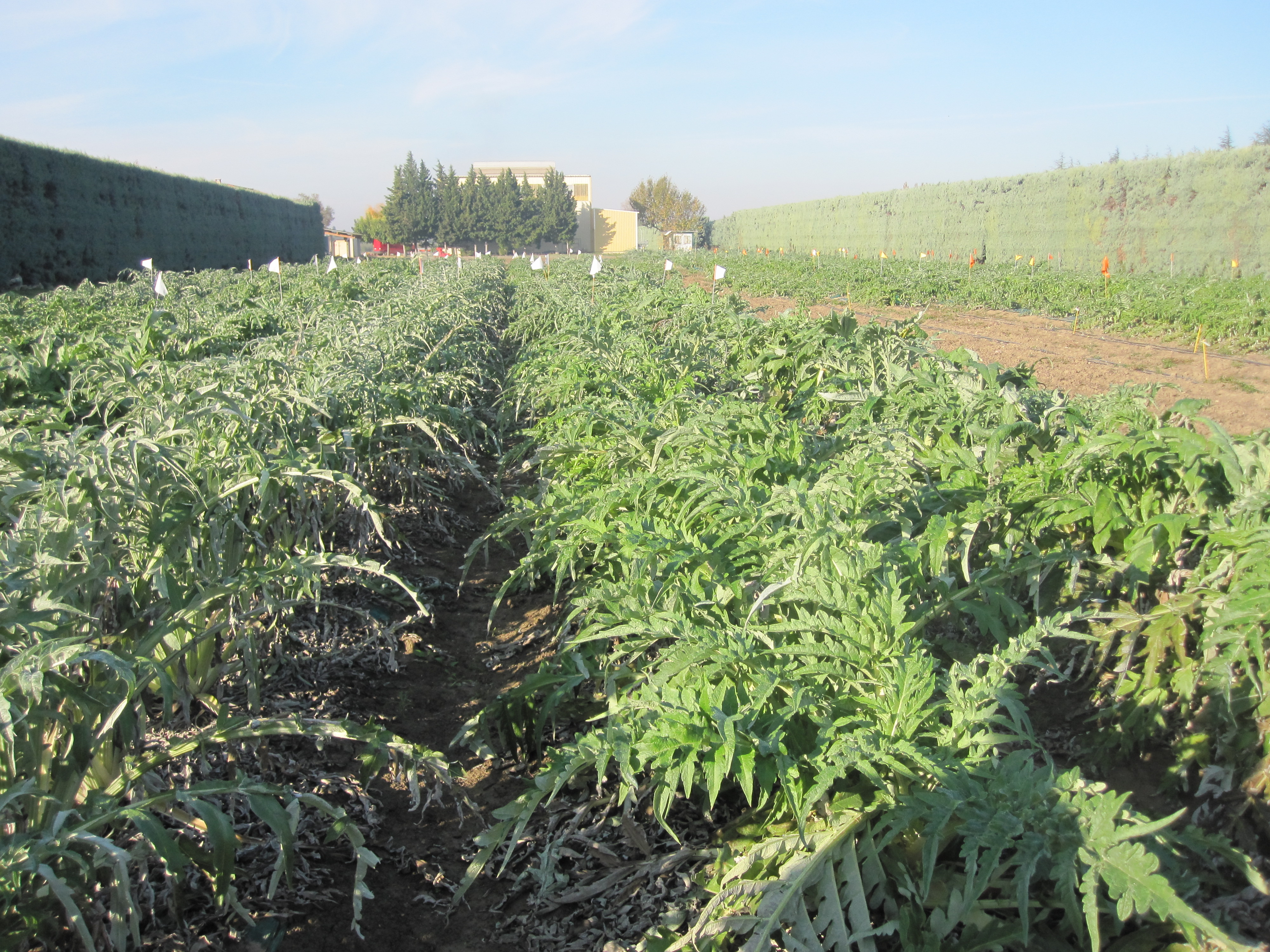 Collection de variétés de cardons à Cavaillon